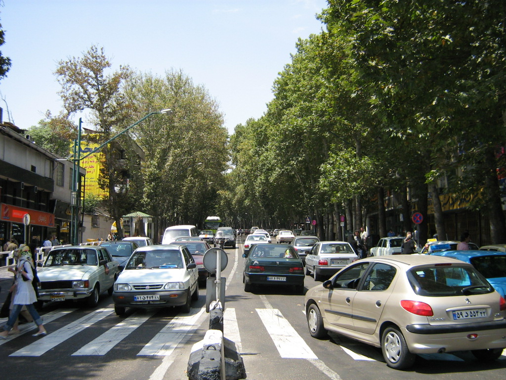 avenue Valieasr